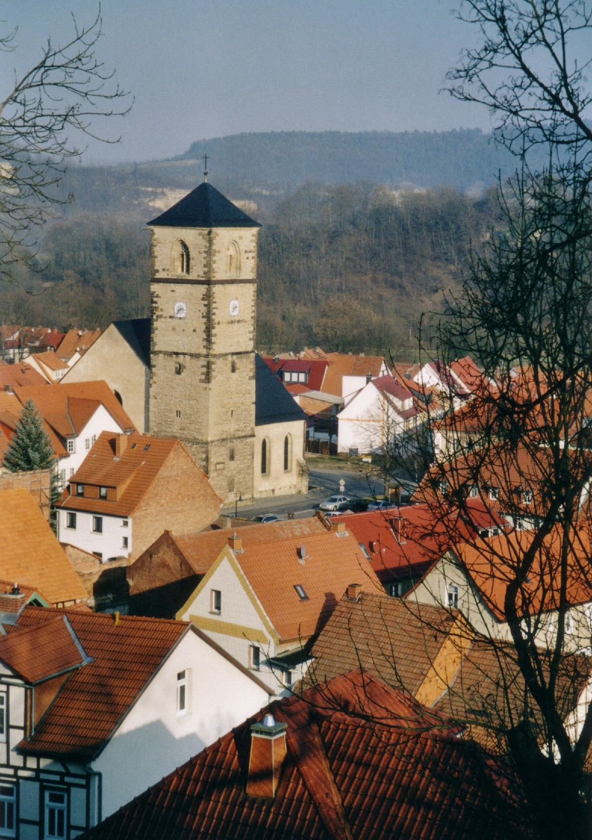 Creuzburg, Wartburgkreis, Thüringen, Deutschland (Germany)